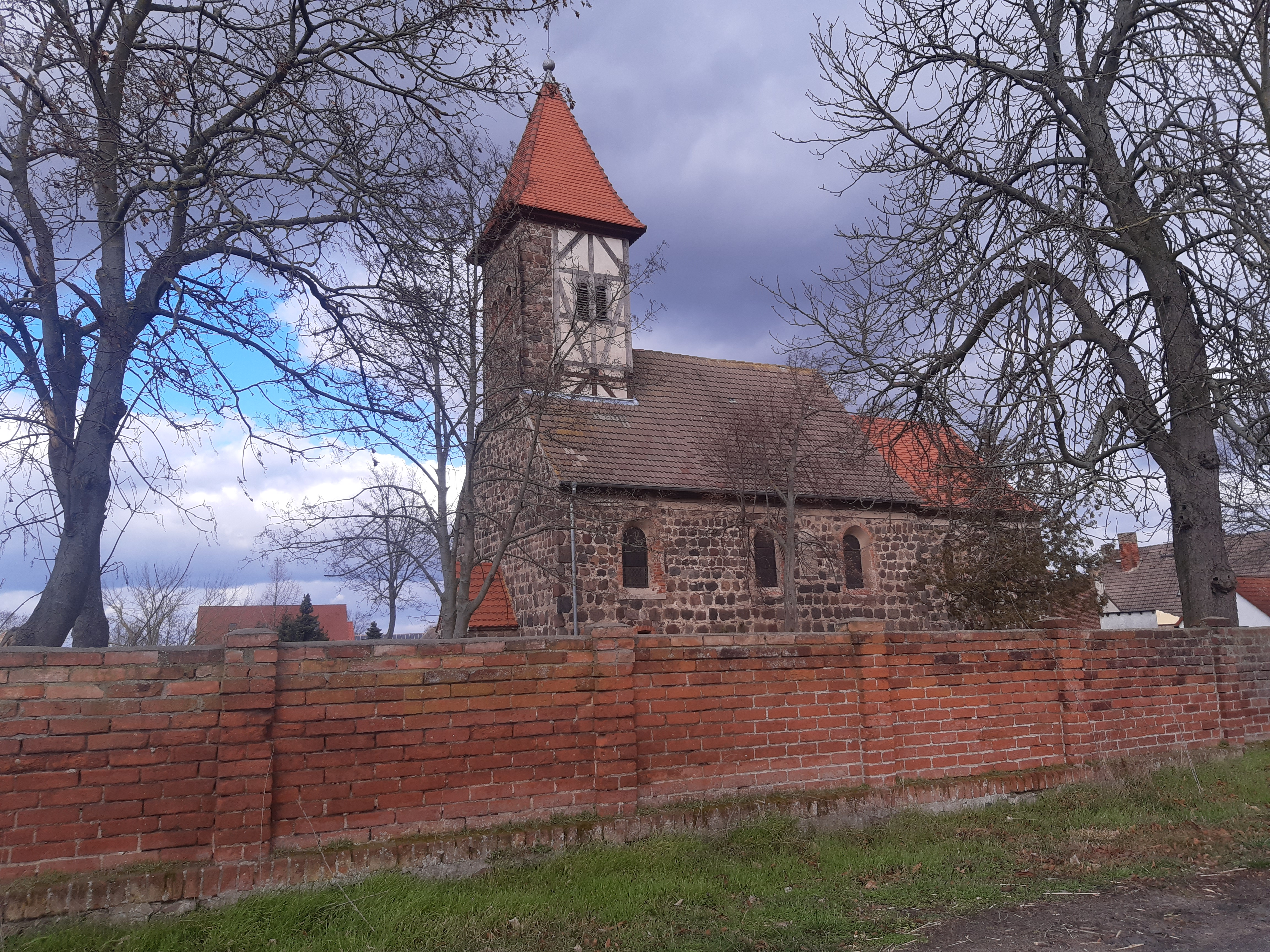 Kirche